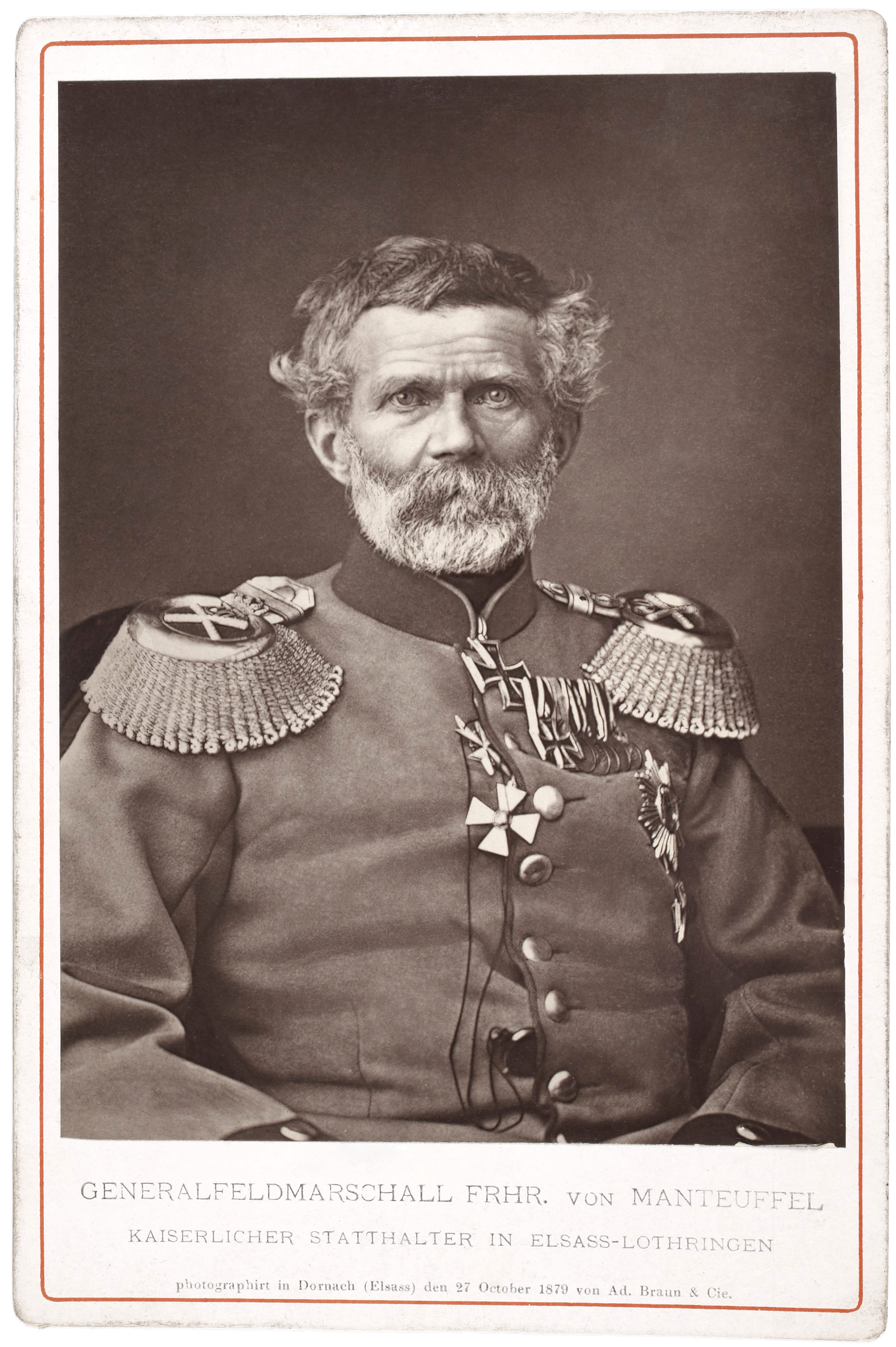 Carte de Visite of Edwin Freiherr von Manteuffel